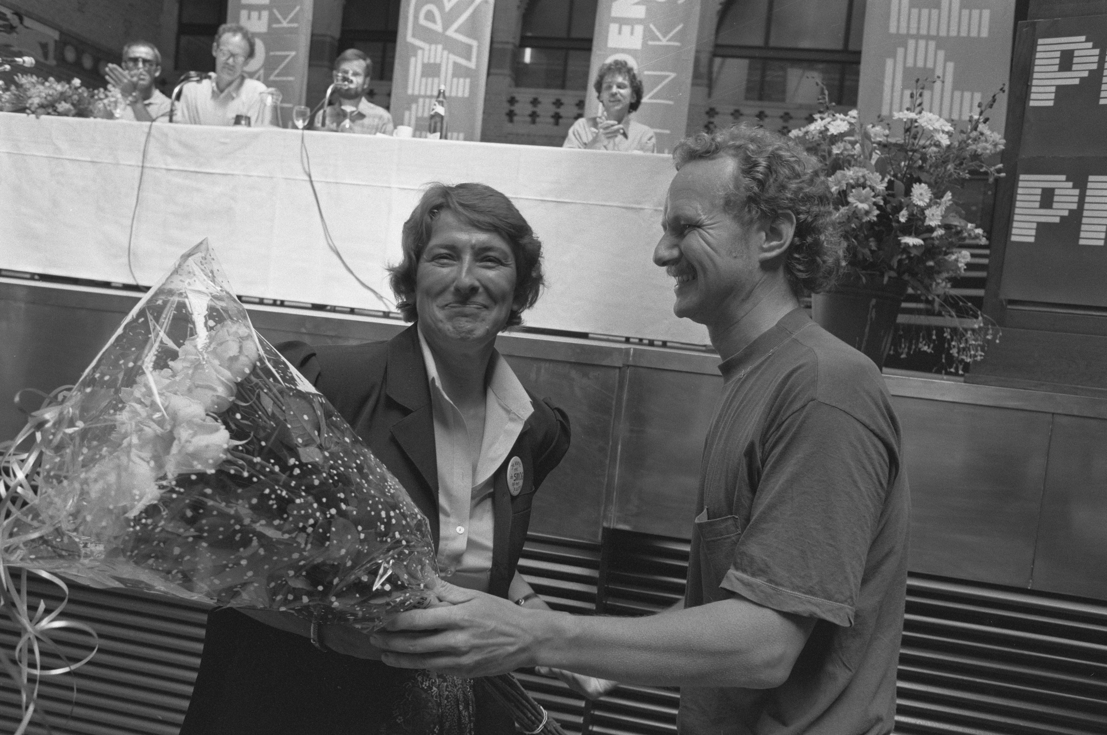 Collectie / Archief : Fotocollectie Anefo Reportage / Serie : PPR-congres in Amsterdam Beschrijving : Ria Beckers is gekozen tot lijsttrekker voor Groen Links, rechts partijvoorzitter Bram van Ojik Datum : 17 juni 1989 Locatie : Amsterdam, Noord-Holland Trefwoorden : congressen, lijsttrekkers, partijvoorzitters, politieke partijen Persoonsnaam : Beckers, Ria, Ojik, Bram van Fotograaf : Bogaerts, Rob / Anefo Auteursrechthebbende : Nationaal Archief Materiaalsoort : Negatief (zwart/wit) Nummer archiefinventaris : bekijk toegang 2.24.01.05 Bestanddeelnummer : 934-4713